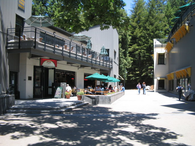 Quarry Plaza